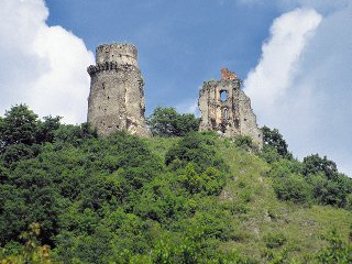 Hrad Slanec This medium shows the protected monument with the number 806-40/0 (other) in the Slovak Republic.